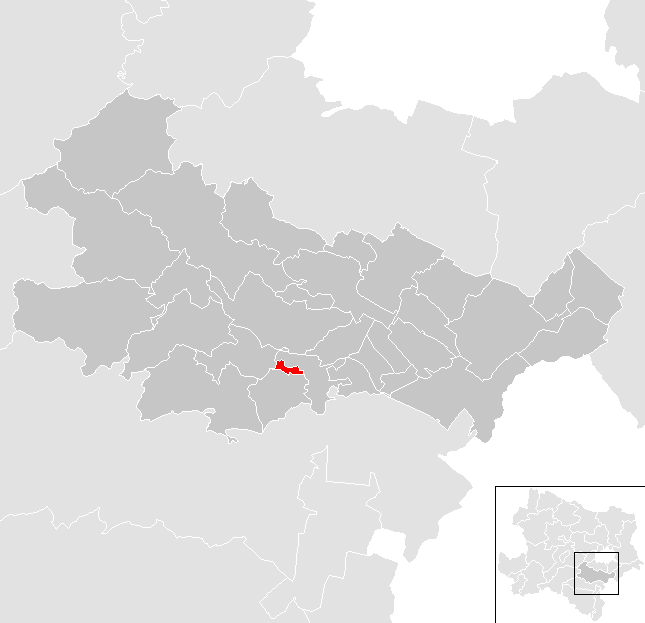 Bezirk Baden